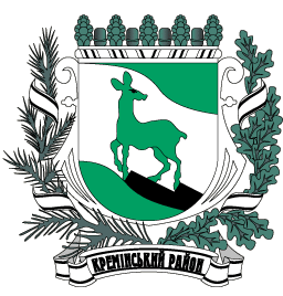 Герб Кременского района